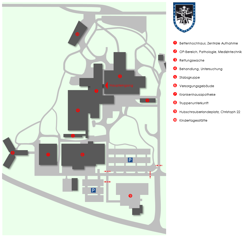 Lageplan Bundeswehrkrankenhaus Ulm